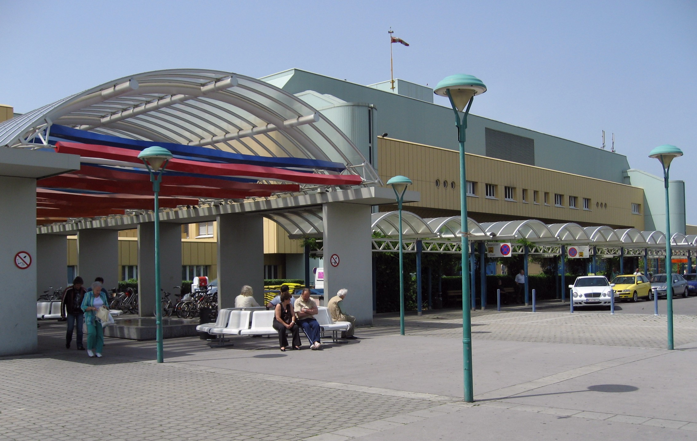 Wien SMZ Ost